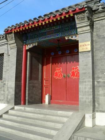 金柱大门 拍摄